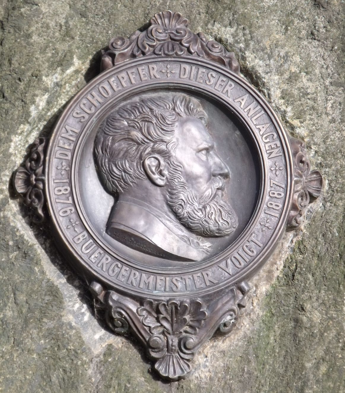 Medaillon mit dem Antlitz Ernst Voigts (1845-1886), das sich vor dem heutigen Alfred-Udo-Holtz-Bau der Hochschule Mittweida. Gestiftet 1887 durch die Bürger von Mittweida für den Schöpfer der Parkanlagen am Schwanenteich.